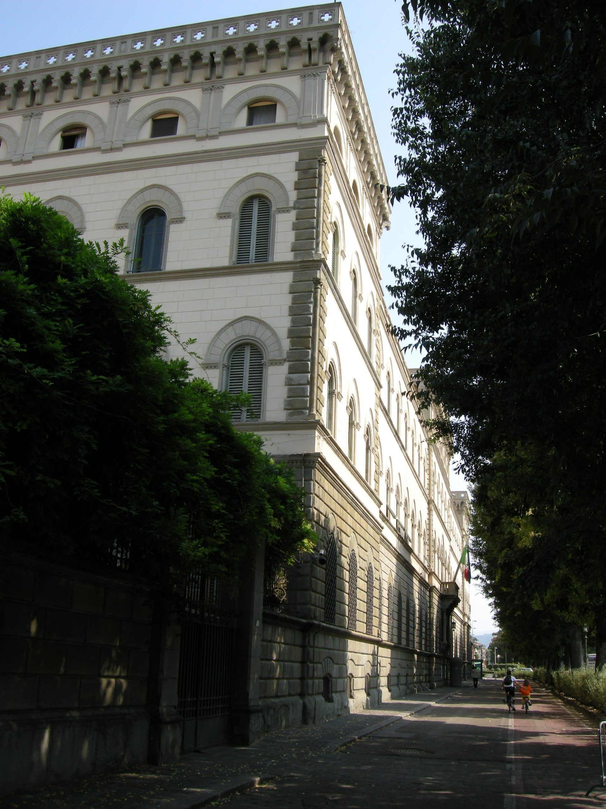 Caserna antonio baldissera